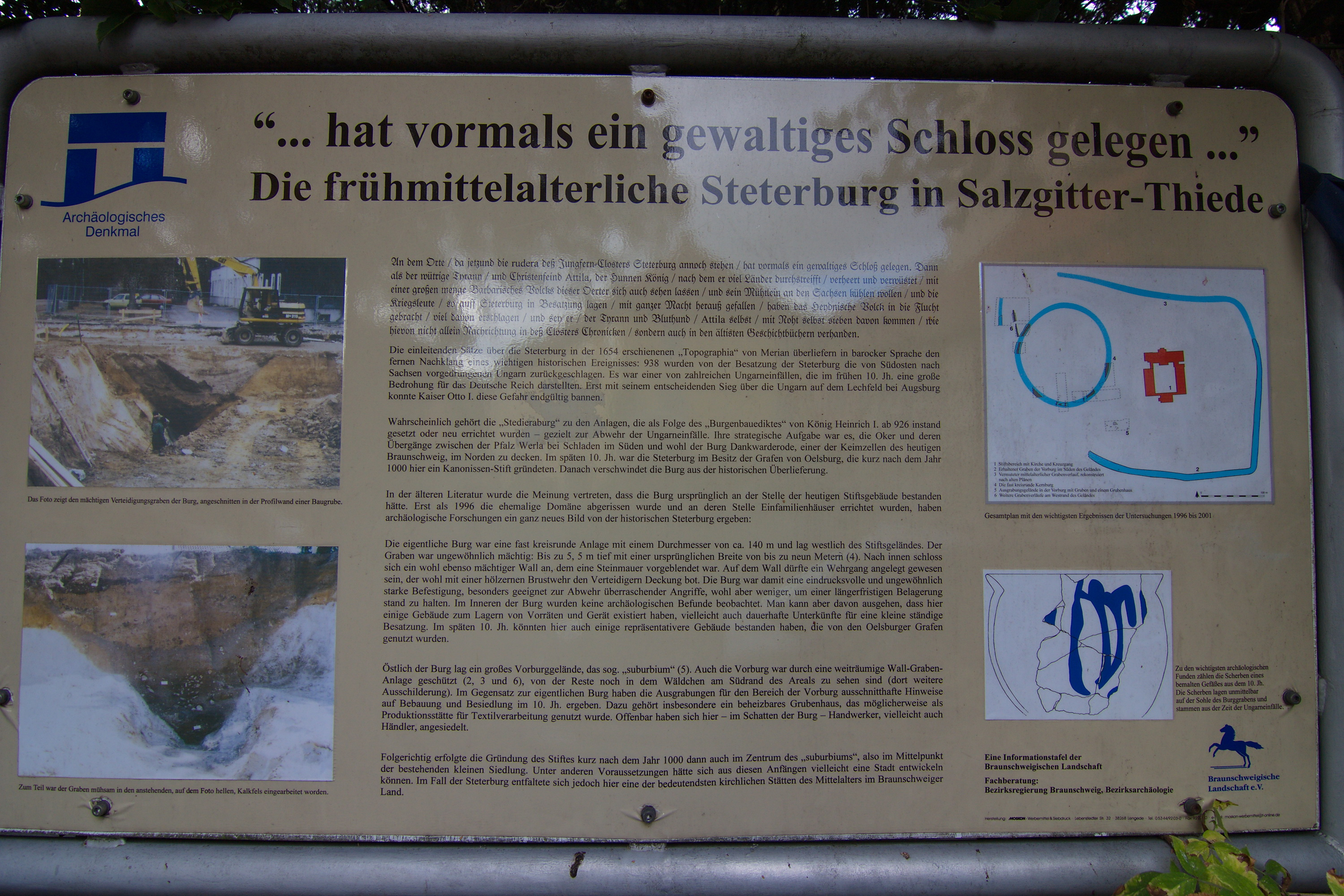 Das Stift Steterburg ist ein ehemaliges Kanonissenstift, späteres Augustiner-Chorfrauen-Stift und ehemaliges evangelisch-lutherisches Frauenstift in Salzgitter-Thiede, in Niedersachsen. Erhaltene Gebäudeteile sind aus dem 11. Jahrhundert. Das Wohnhaus der Äbtissin entstand 1691. Die Stiftskirche ist 1752 errichtet worden.